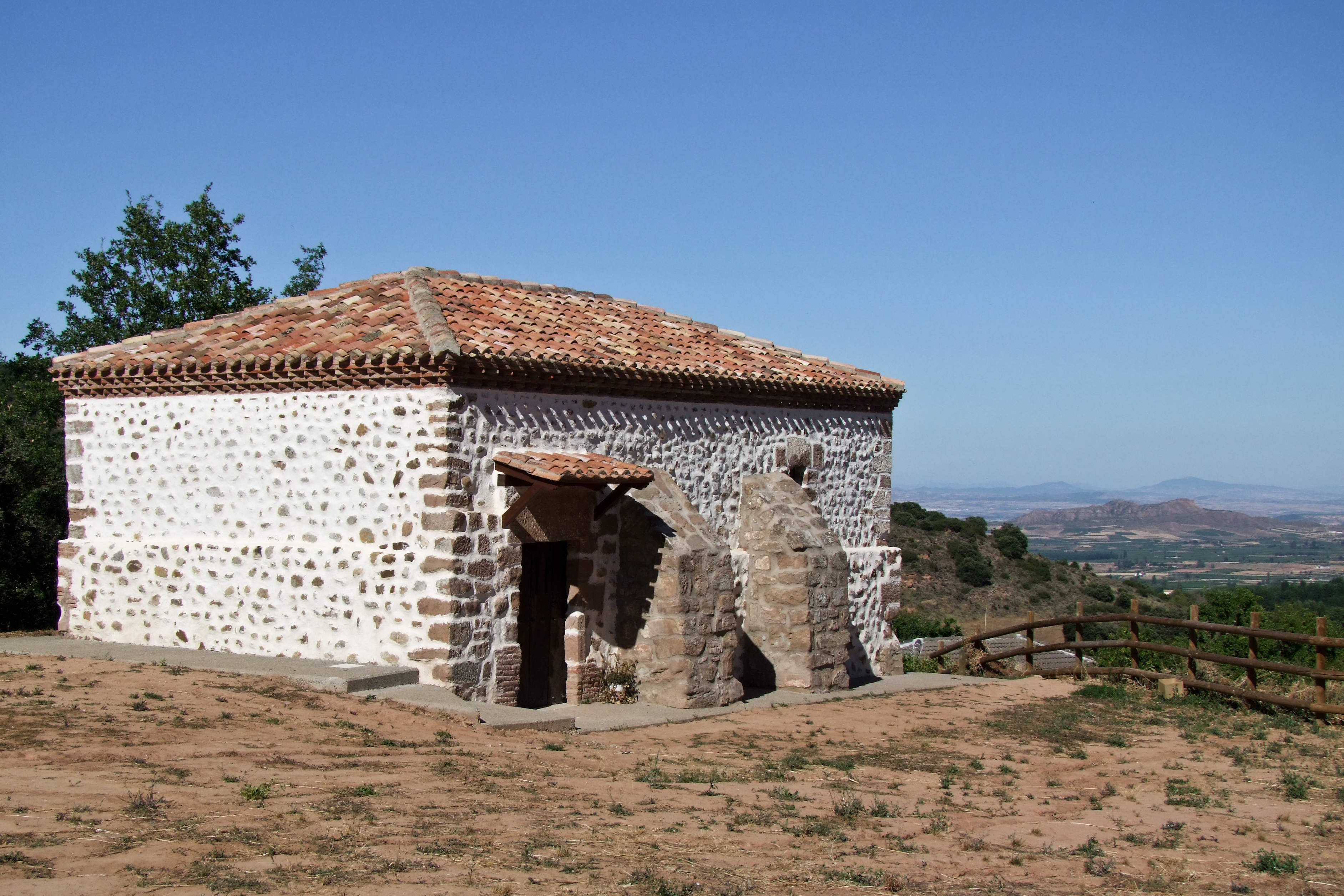 Ermita de San Lorenzo en la localidad de Daroca de Rioja, La Rioja - España